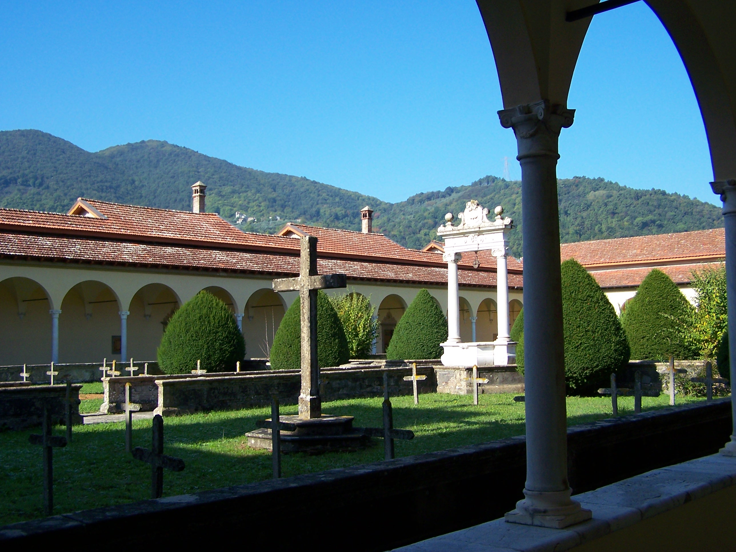 Kartuzja w Farneta we Włoszech